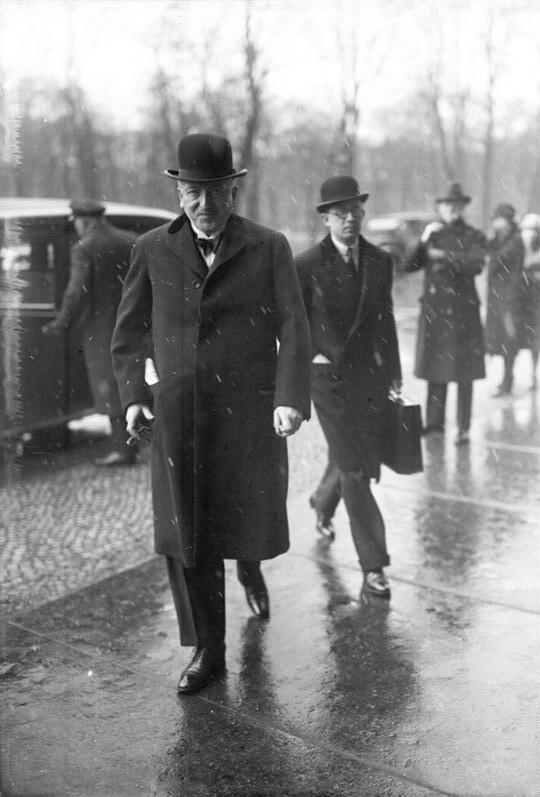 Der Kampf um die Young-Gesetze im Reichstag in Berlin! Die bedeutungsvolle Sitzung, an welcher die Abgeordneten aller Parteien teilnahmen. Der Staatssekretär des Auswärtigen Amts Dr. von Schubert begibt sich zur Lesung der Young-Gesetze in den Reichstag.